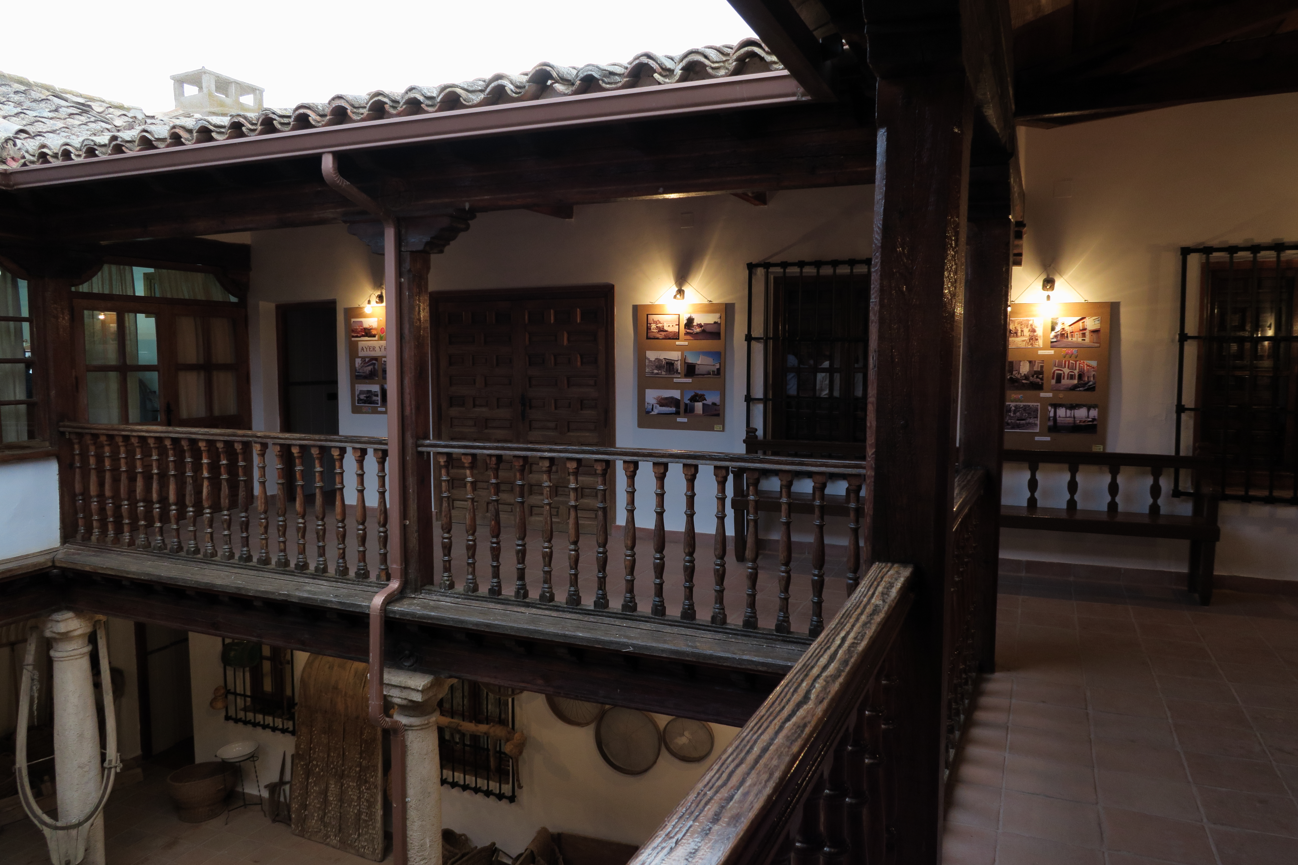 Casa de los Jaenes, La Guardia, Toledo